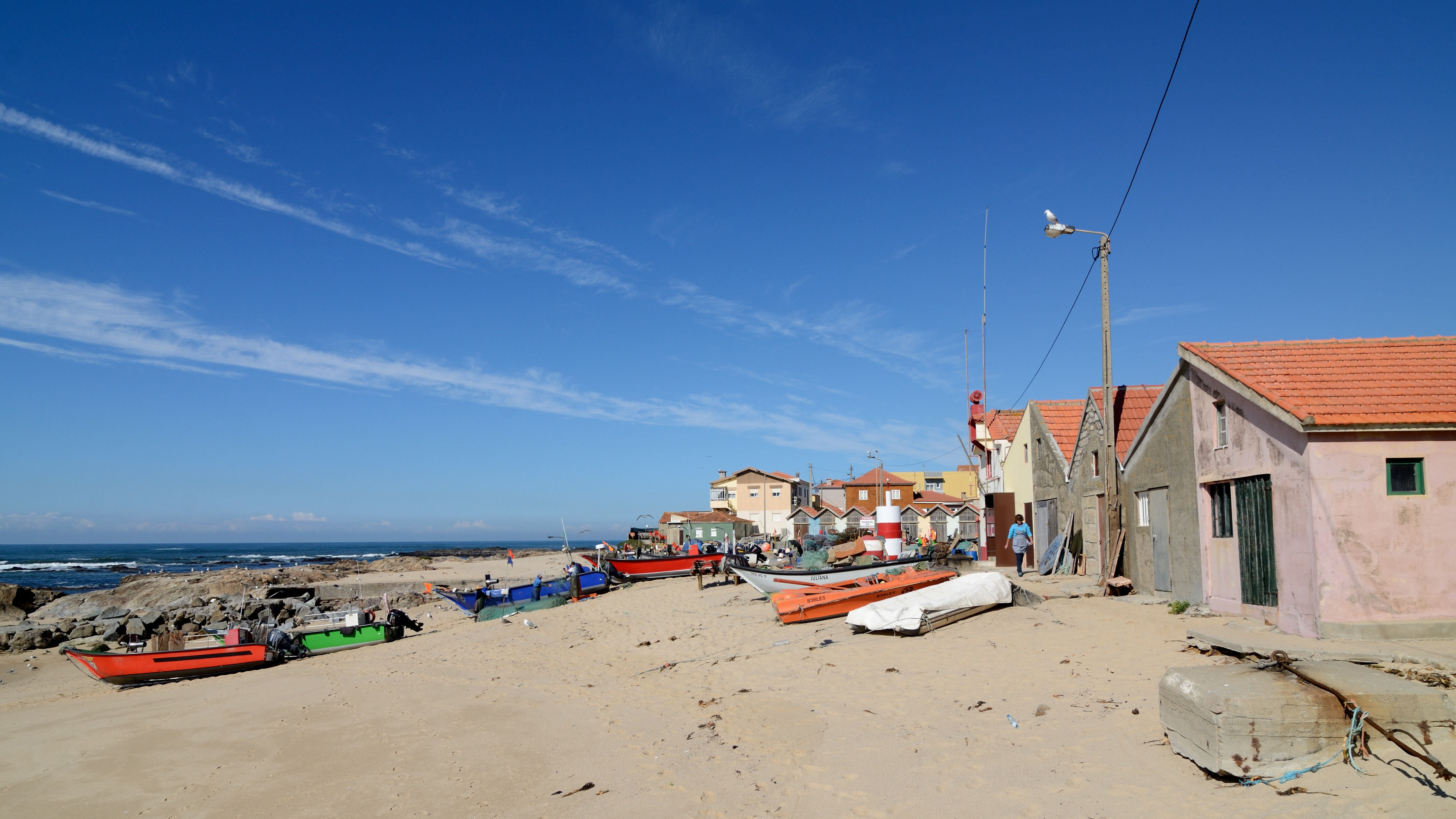 Vila Chã, Portugal [2012]